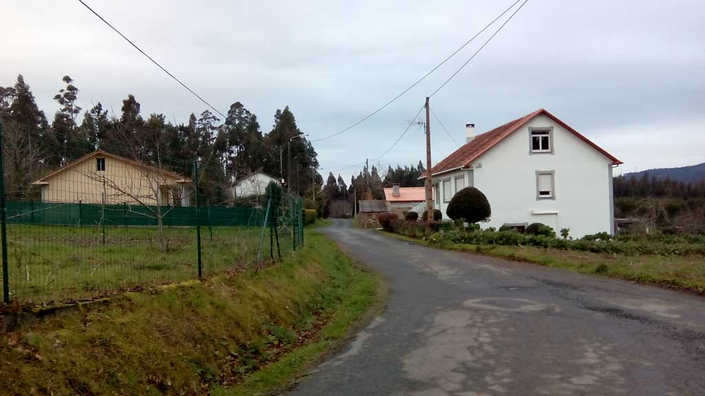 Vista de Painzás, Pedroso, Narón.